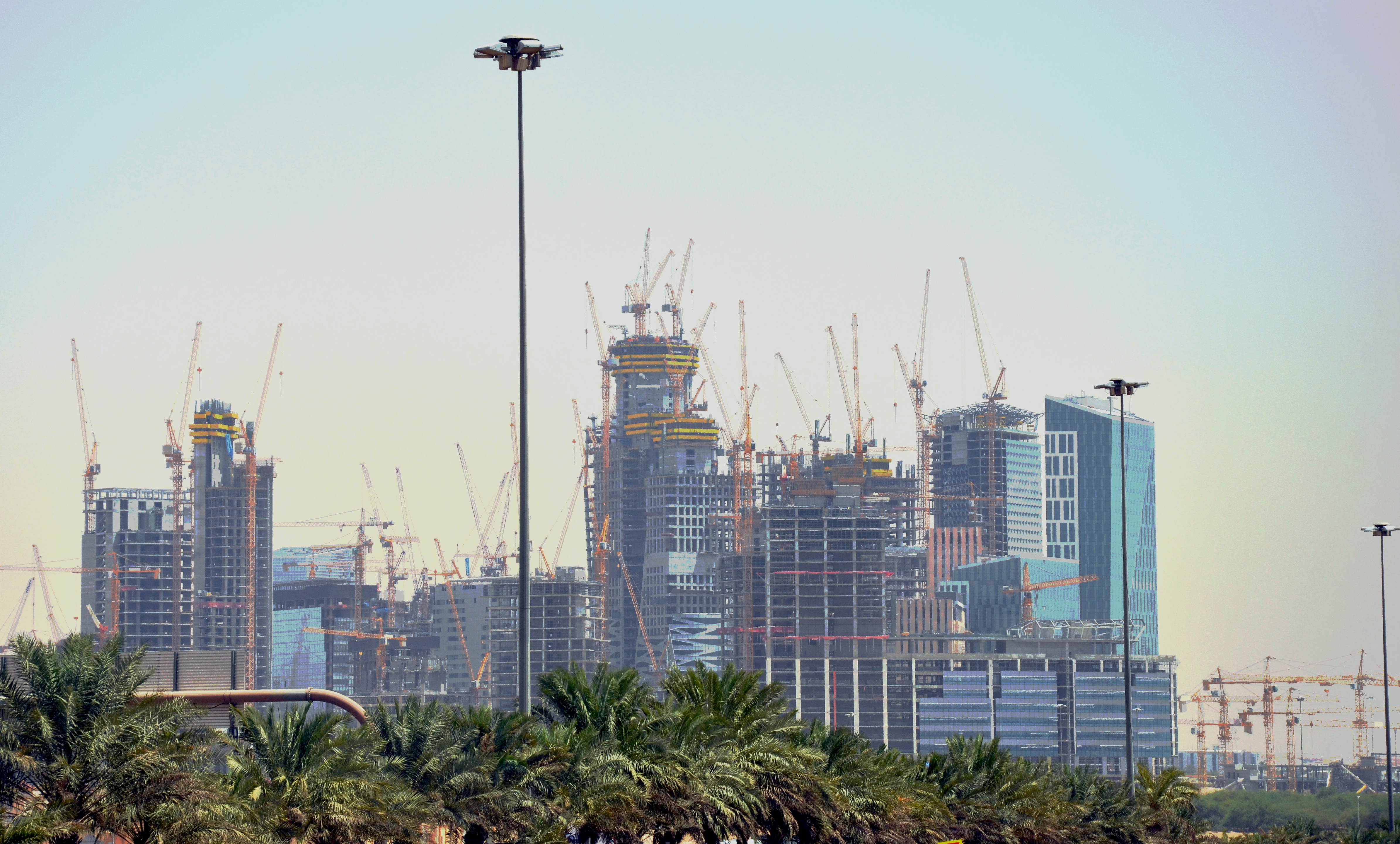 مركز الملك عبد الله المالي مدينة الرياض